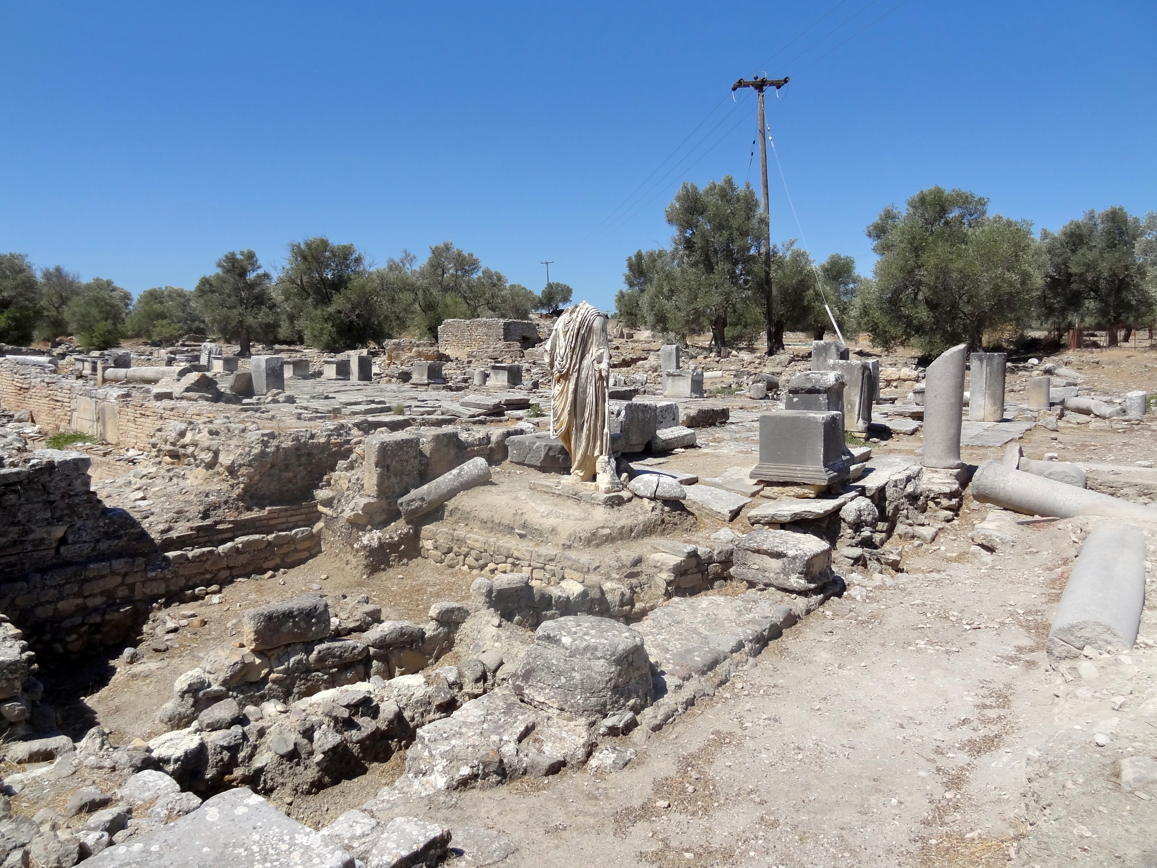 Reste der griechisch-römischen Stadt Gortyn (Γορτύν), Gemeinde Gortyna, Regionalbezirk Iraklio, Kreta, Griechenland